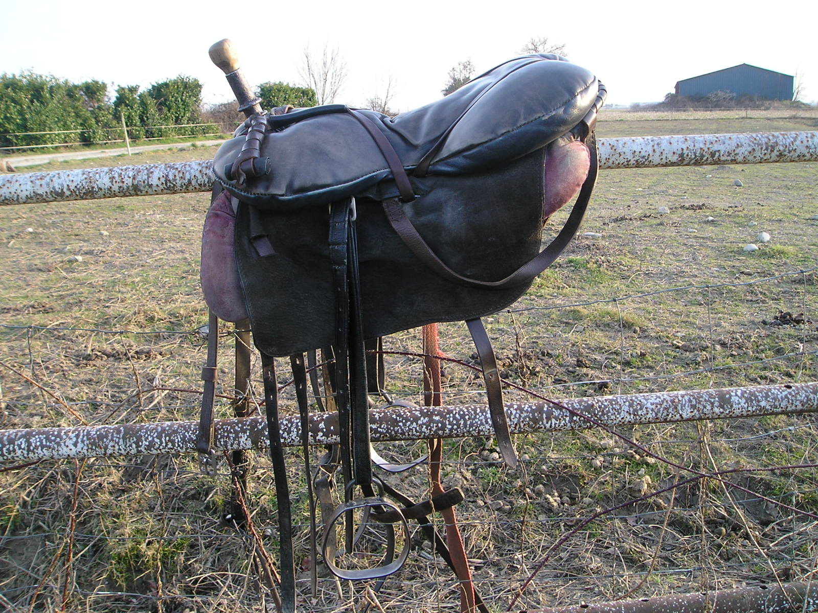 selle de voltige, équitation, voltige cosaque